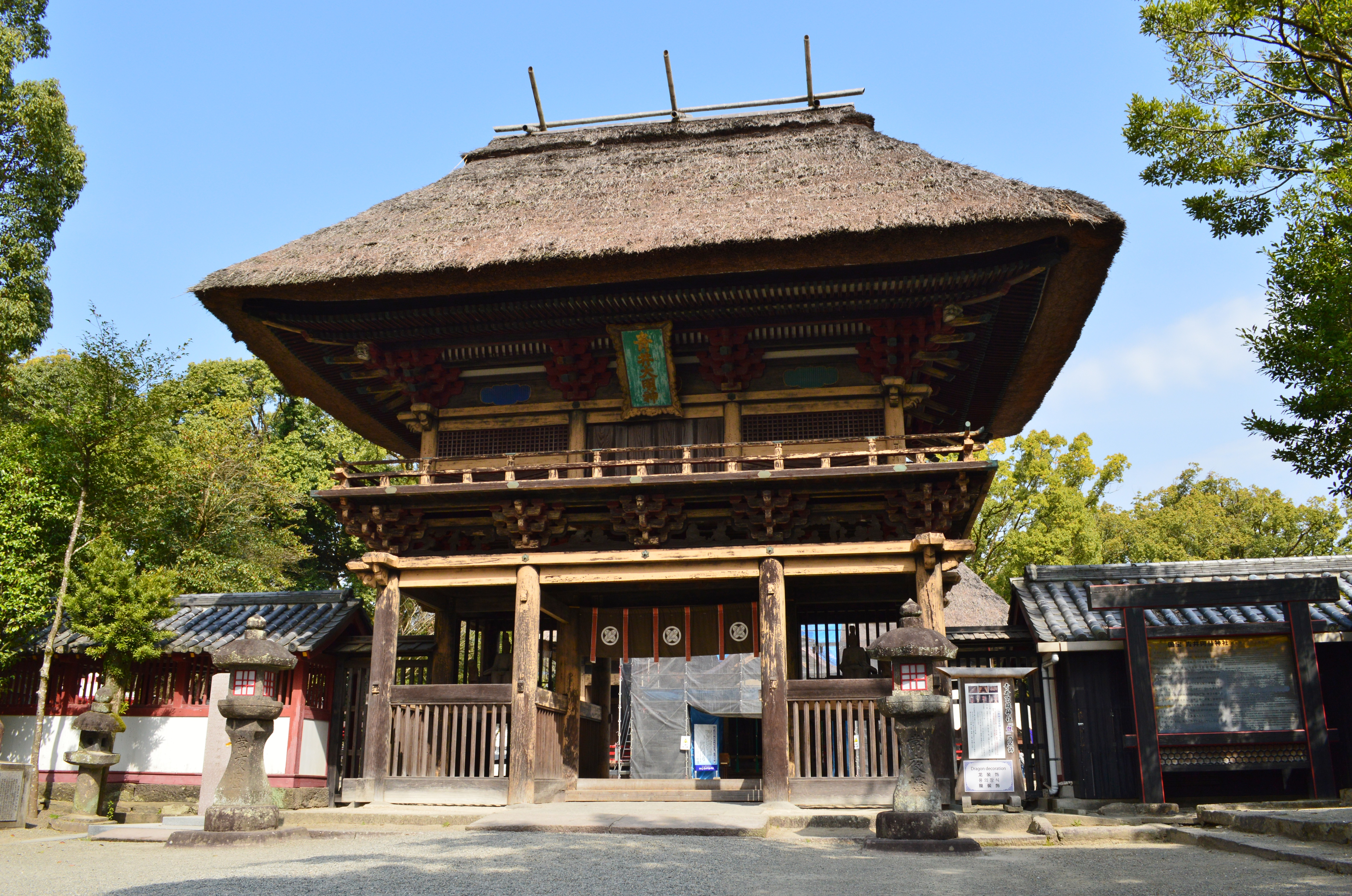 青井阿蘇神社 楼門